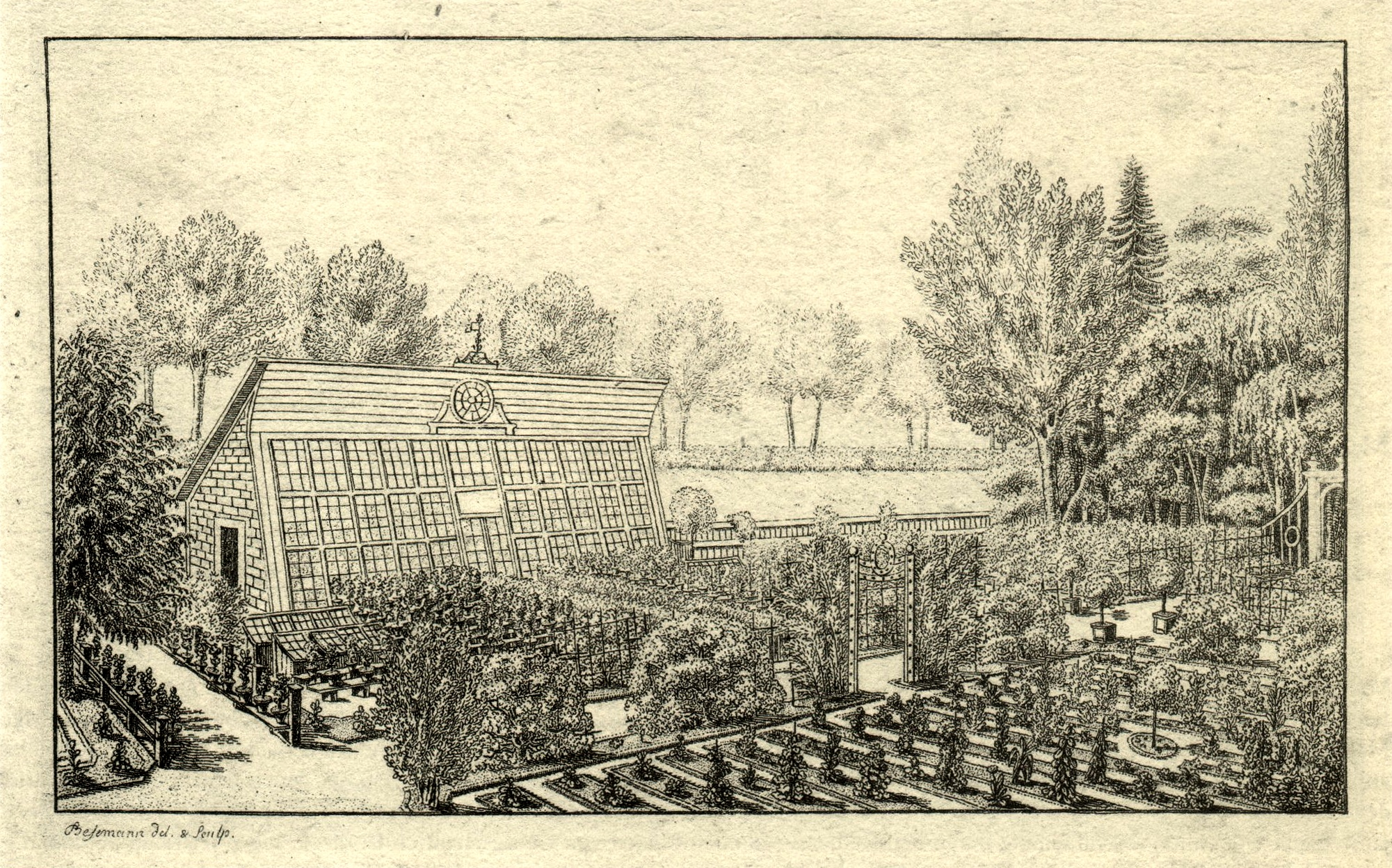 Blick vom Direktorenhaus auf den botanischen Garten der Georg-August-Universität Göttingen. Das (heute nicht mehr vorhandene) Gewächshaus wurde 1738 errichtet. Im Hintergrund der Stadtwall. Stammbuchblatt. Radierung.